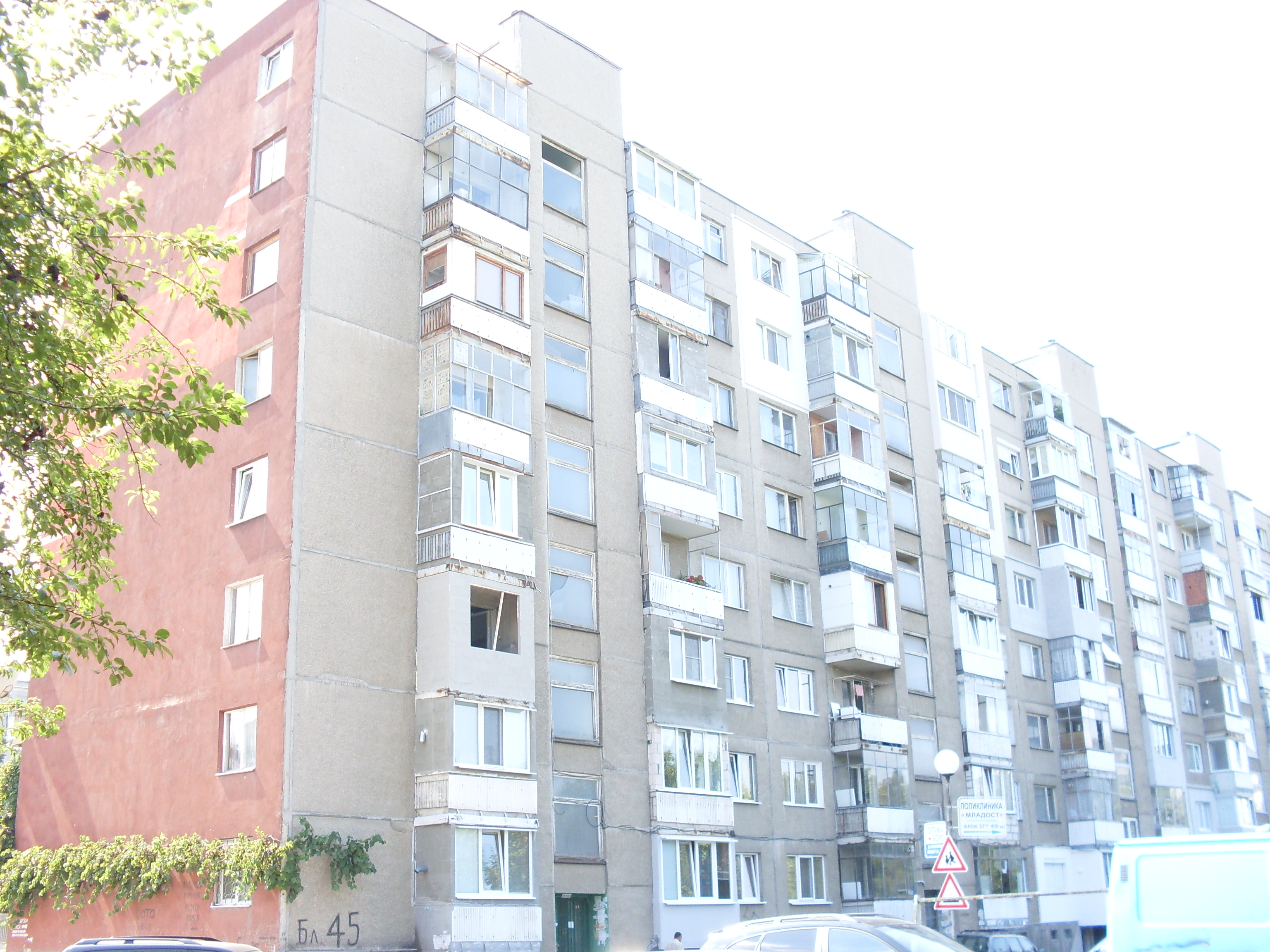 Жилищна сграда по номенклатура Бс-2-64 - фасада север/запад